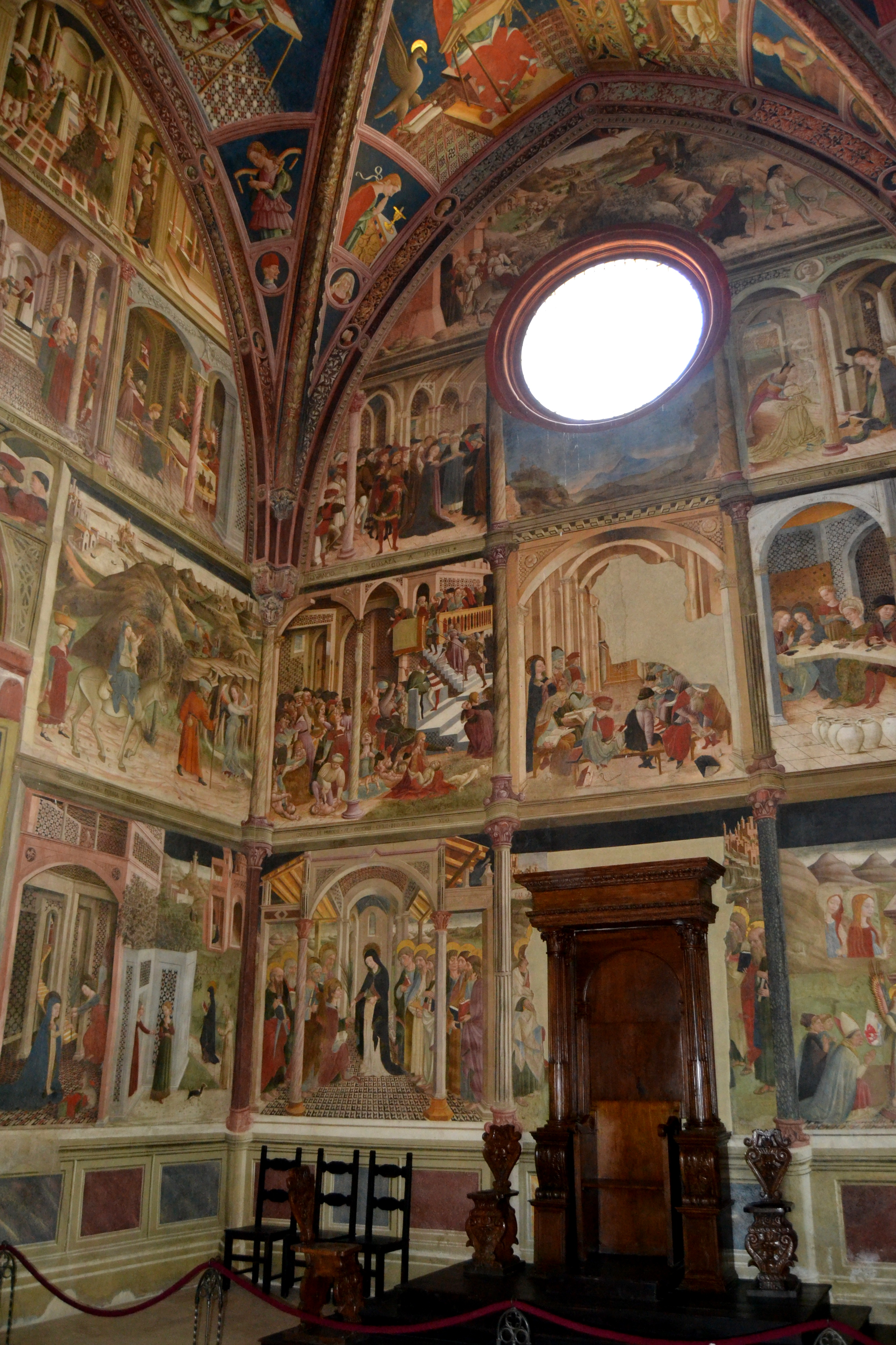 Concattedrale di Atri, interno (particolare del coro affrescato da A. de Litio)